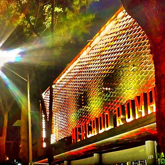 Mercado Roma at night